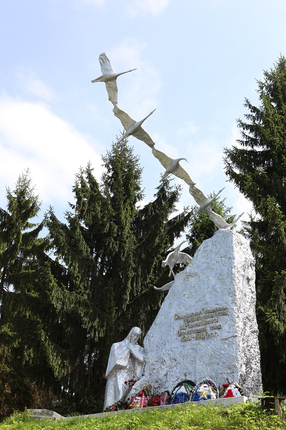 Памятник семи братьям Газдановым, погибшим на фронтах Великой Отечественной войны: на обочине шоссе Орджоникидзе-Алагир, Дзуарикау, Алагирский район, Северная Осетия